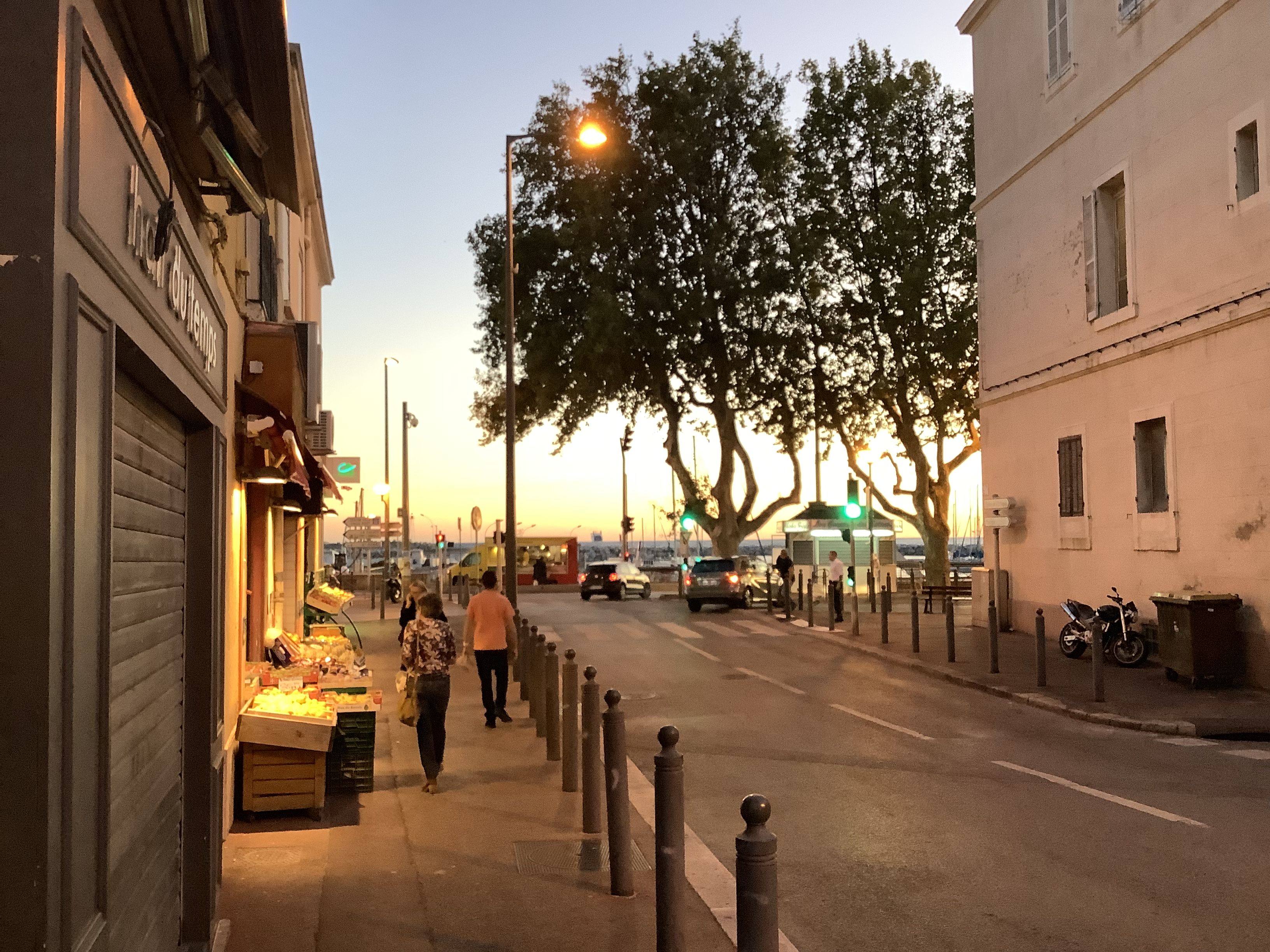 L'Estaque de nuit (Marseille, France)